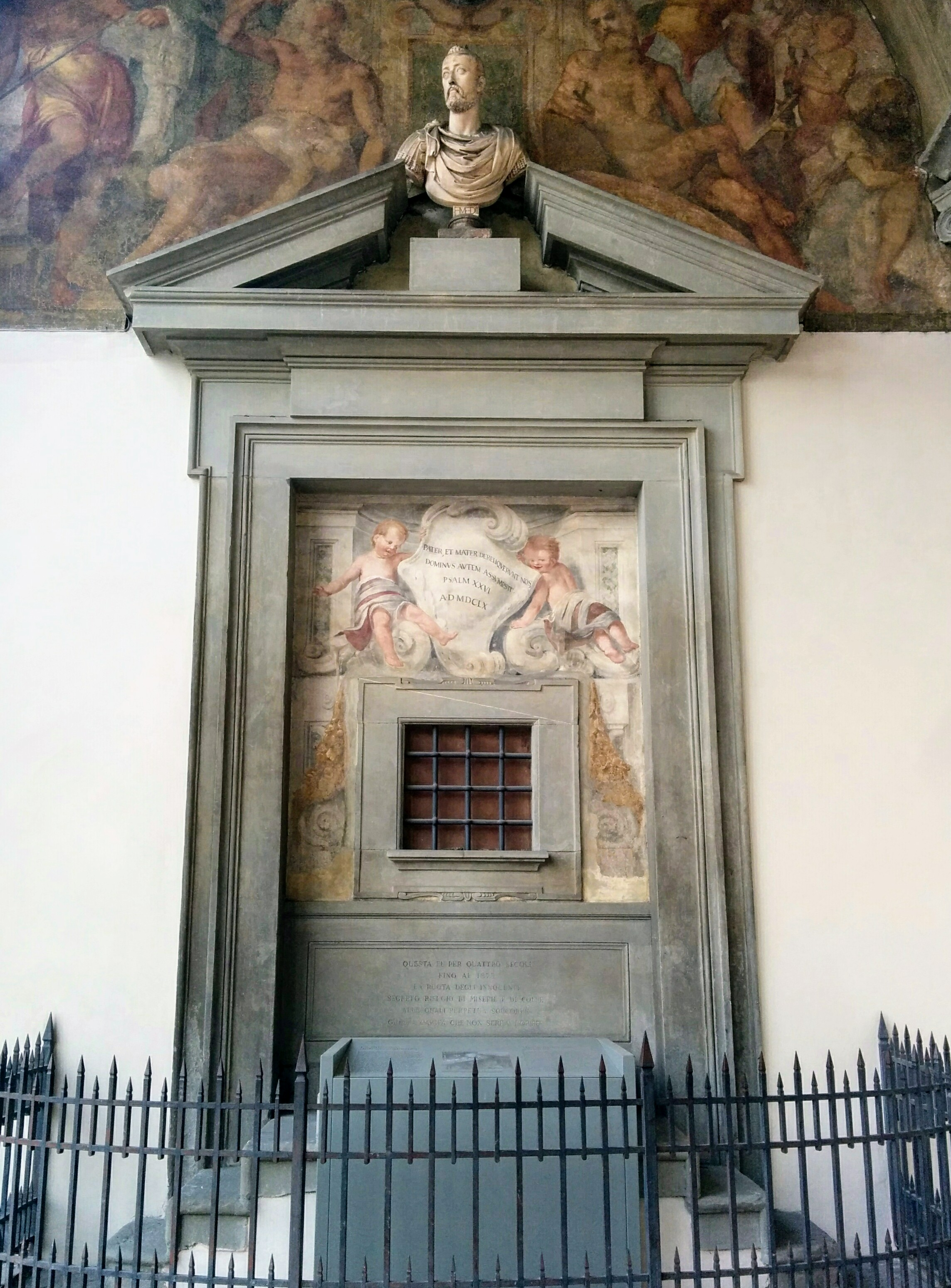 La finestra ferrata dell'Istituto degli Innocenti